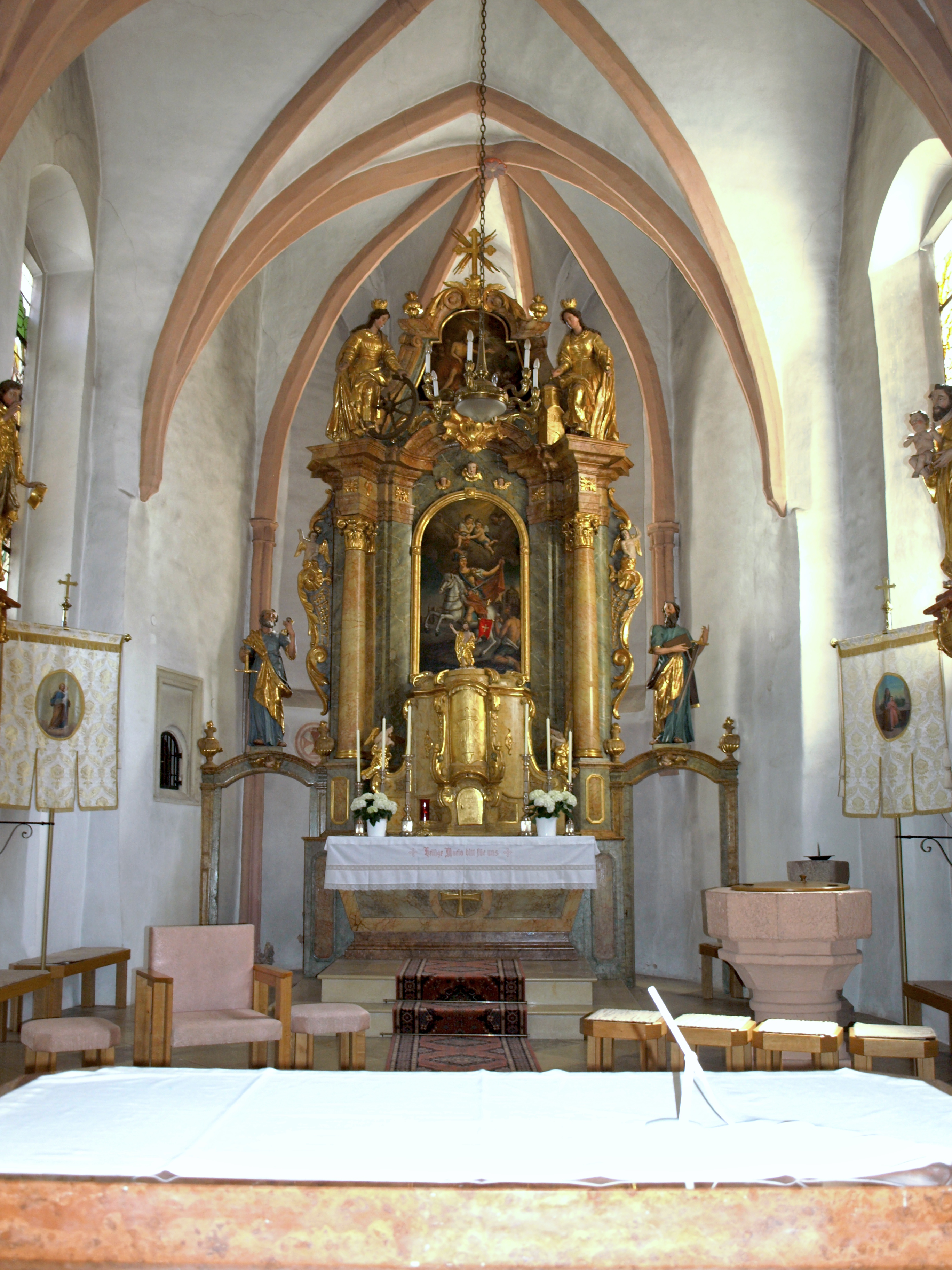 Kath. Pfarrkirche hl. Martin und Glocke